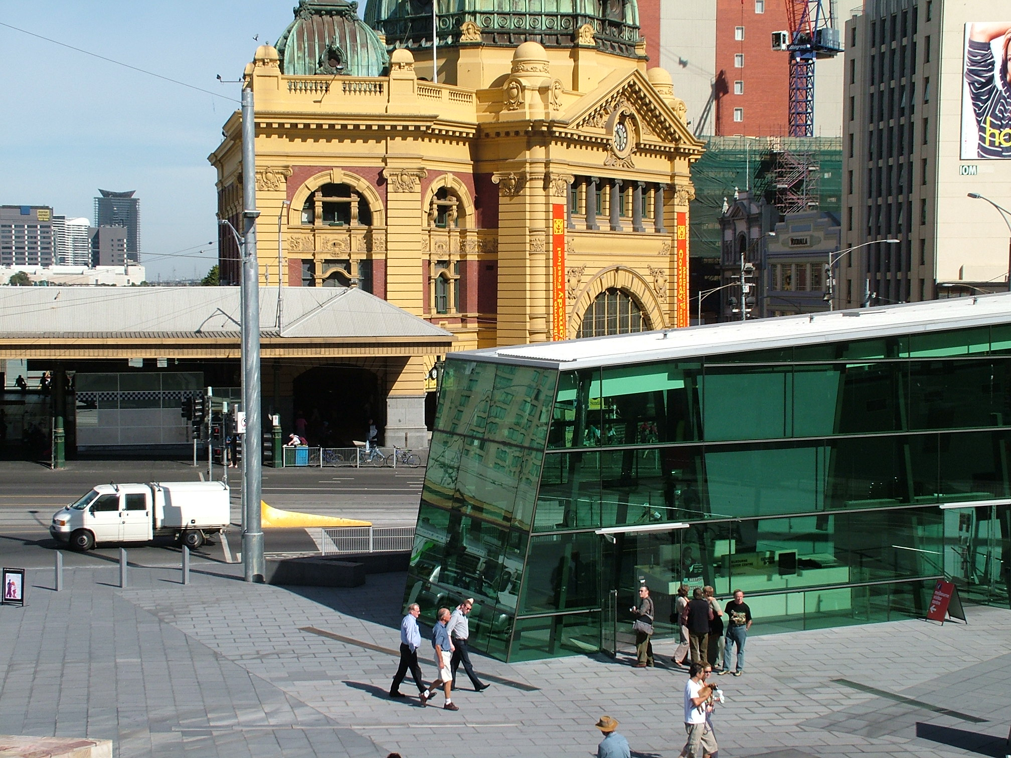 Fra Federation Square mot Flinders Street Station og turistonformasjonen i glasshuset. Jarle Andersen